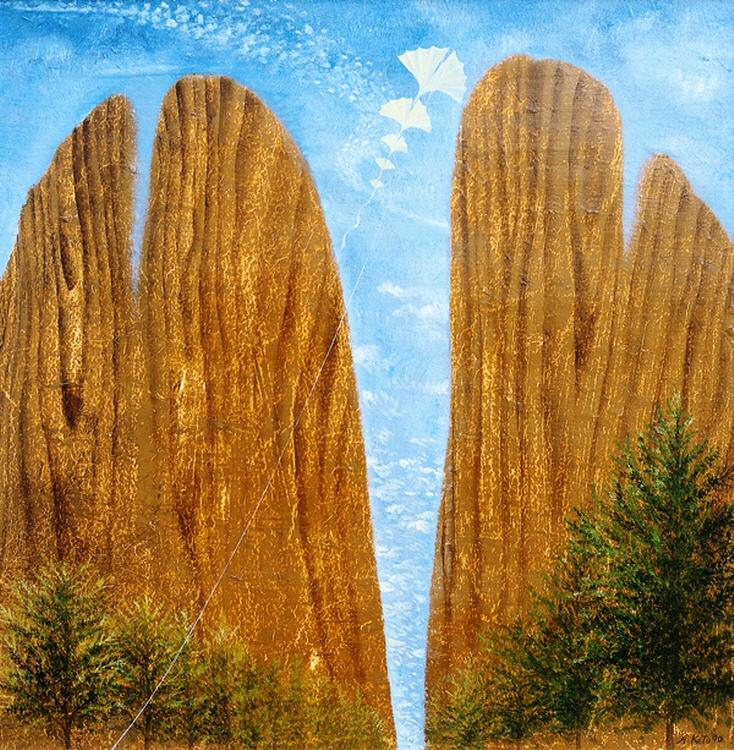 Atsuko Kato (geb. 1950), Drachenflug am Ginkgoberg, 1990, 38x47 cm, Öl auf Holz, Privatbesitz. Auf dem Bild befinden sich vorne einige grüne Nadelbäume und die beiden Hälften eines Ginkgoblattes, die wie rotgoldene Berge aus Holz in die Höhe ragen. Den Hintergrund bildet ein leicht bewölkter, hellblauer Himmel. Ein zarter, weißer, unauffälliger Drache überspannt die Landschaft. Drachen bedeuten in Japan Kraft und Phantasie. An Neujahr oder bei einer Geburt lassen Japaner Drachen mit guten Wünsche in den Himmel steigen. Während Himmel, Drachen und Nadelbäume realistisch gestaltet sind, bilden die beiden Berge ein surreales Gegenstück. Die Berge sind die zwei Hälften eines überdimensionalen Ginkgoblattes, das aus Holz besteht. Wie im Surrealismus soll diese Verfremdung die Phantasie des Betrachters anregen. Feste Vorstellungen sollen aufgeweicht werden, um Probleme mit neuen, kreativen Lösungen anzugehen. Die Künstlerin Atsuko Kato möchte vielleicht verdeutlichen, wie wichtig neue Ideen und Zuversicht neben Mut und Tatkraft sind. Gefühl und Verstand, Sanftheit und Robustheit, Träume und Realitätsbewusstsein sollten in einem harmonischen Verhältnis zueinander stehen, damit Freundschaft und Frieden möglich sind.